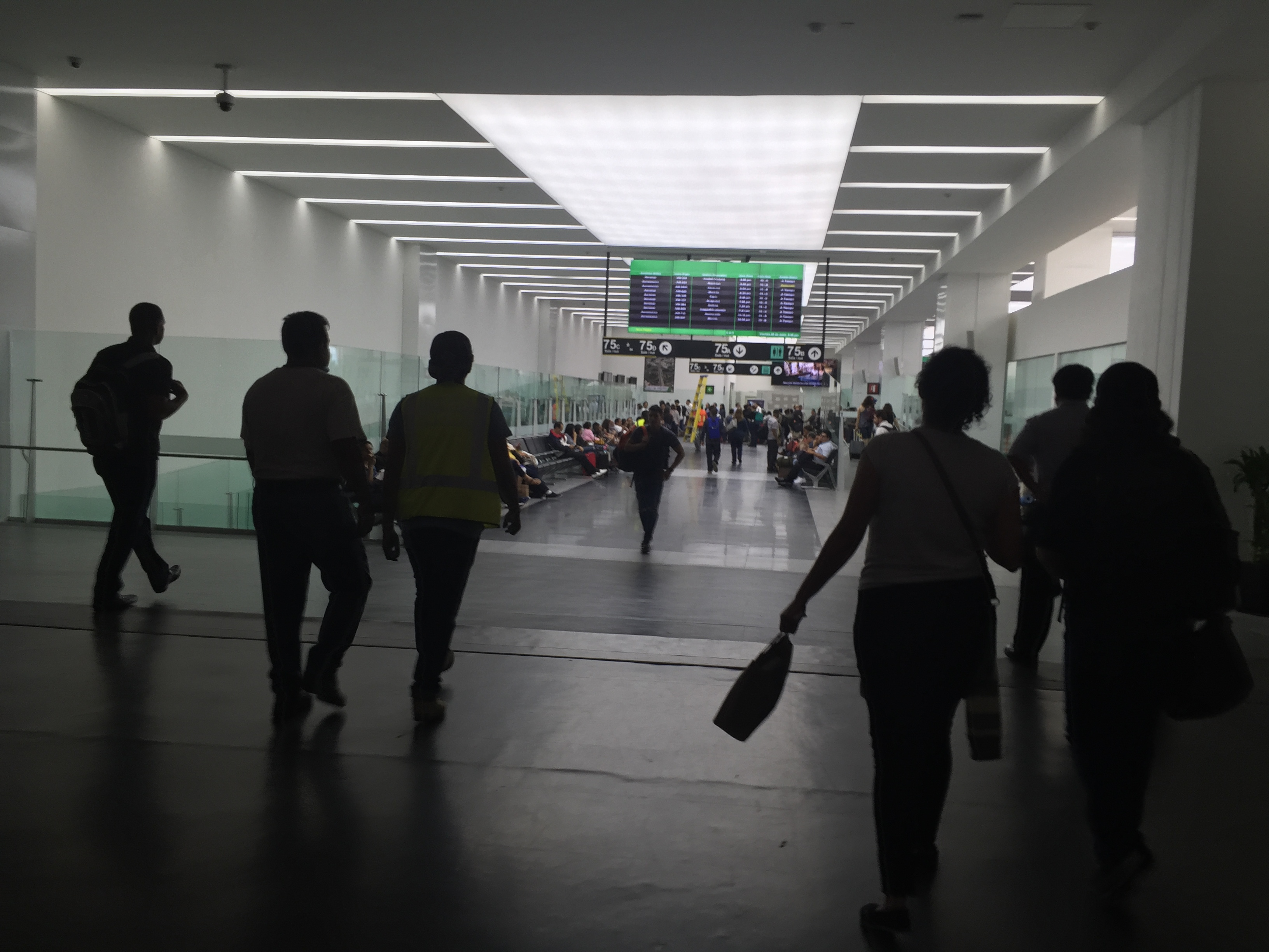 Nueva Sala 75 de la Terminal 2 del Aeropuerto Internacional de la Ciudad de México.